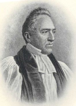 Portrait de Levi Silliman Ives (1797-1867), évêque épiscopalien converti au catholicisme.